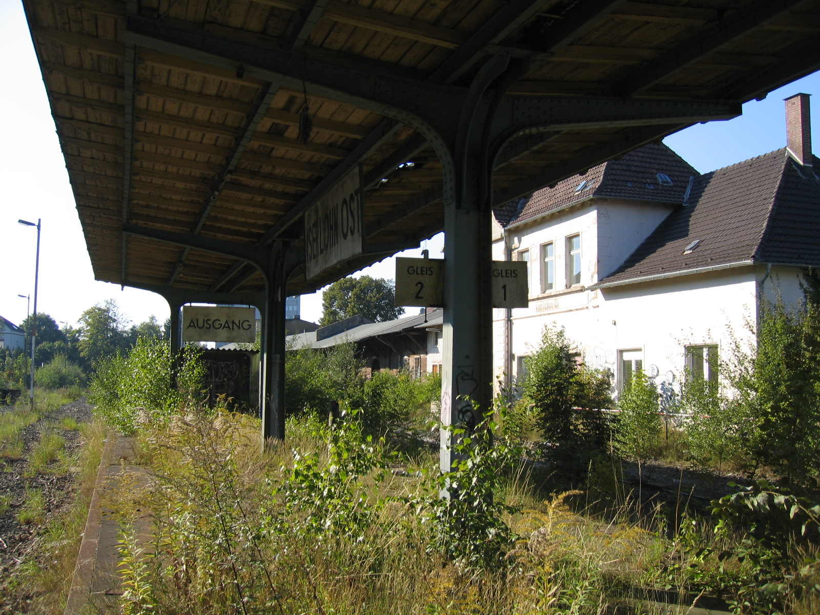 Description: Ehemaliger Bahnhof Iserlohn Ost in Iserlohn. Source: selbst fotografiert Date:21. Sept. 2005 Author: Bubo